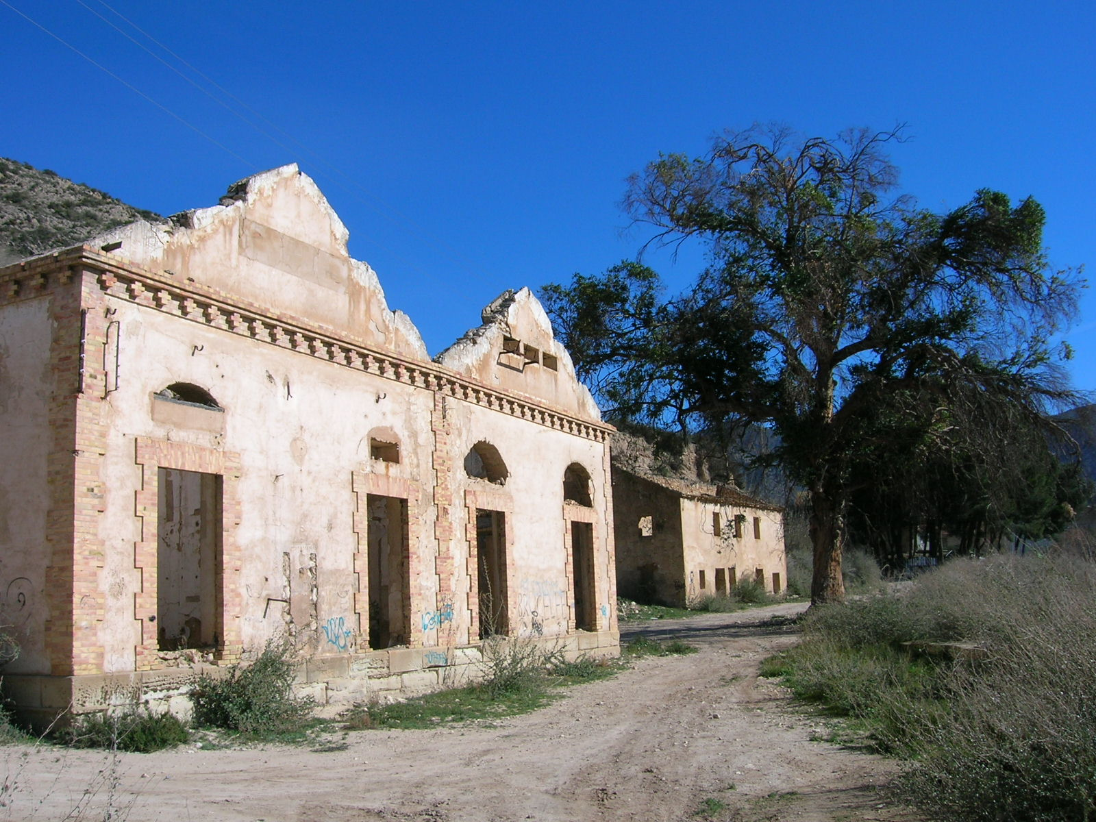 Antigua Fábrica de la Luz, Elda, Alicante